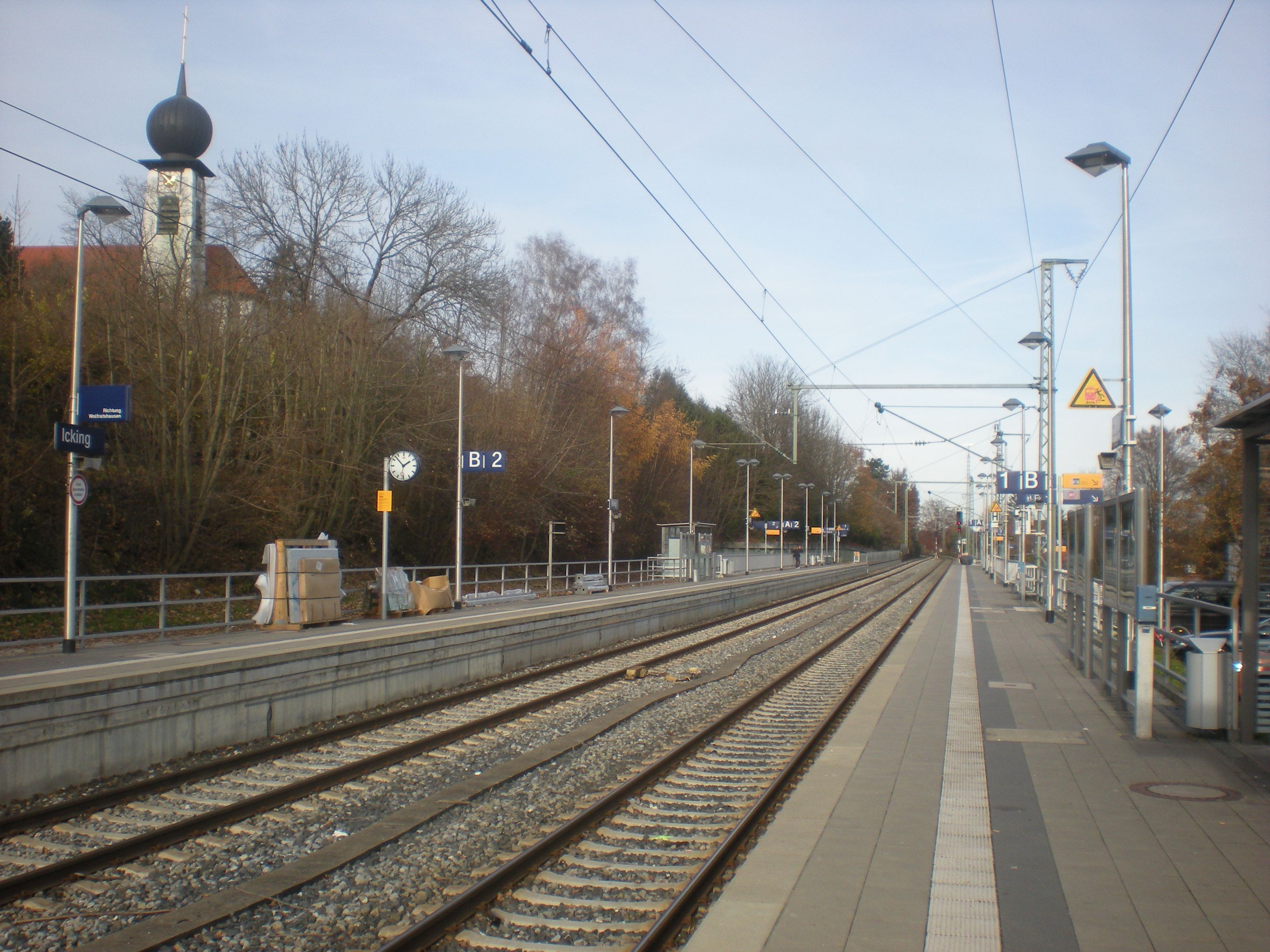 Seitenbahnsteige des S-Bahnhofs Icking